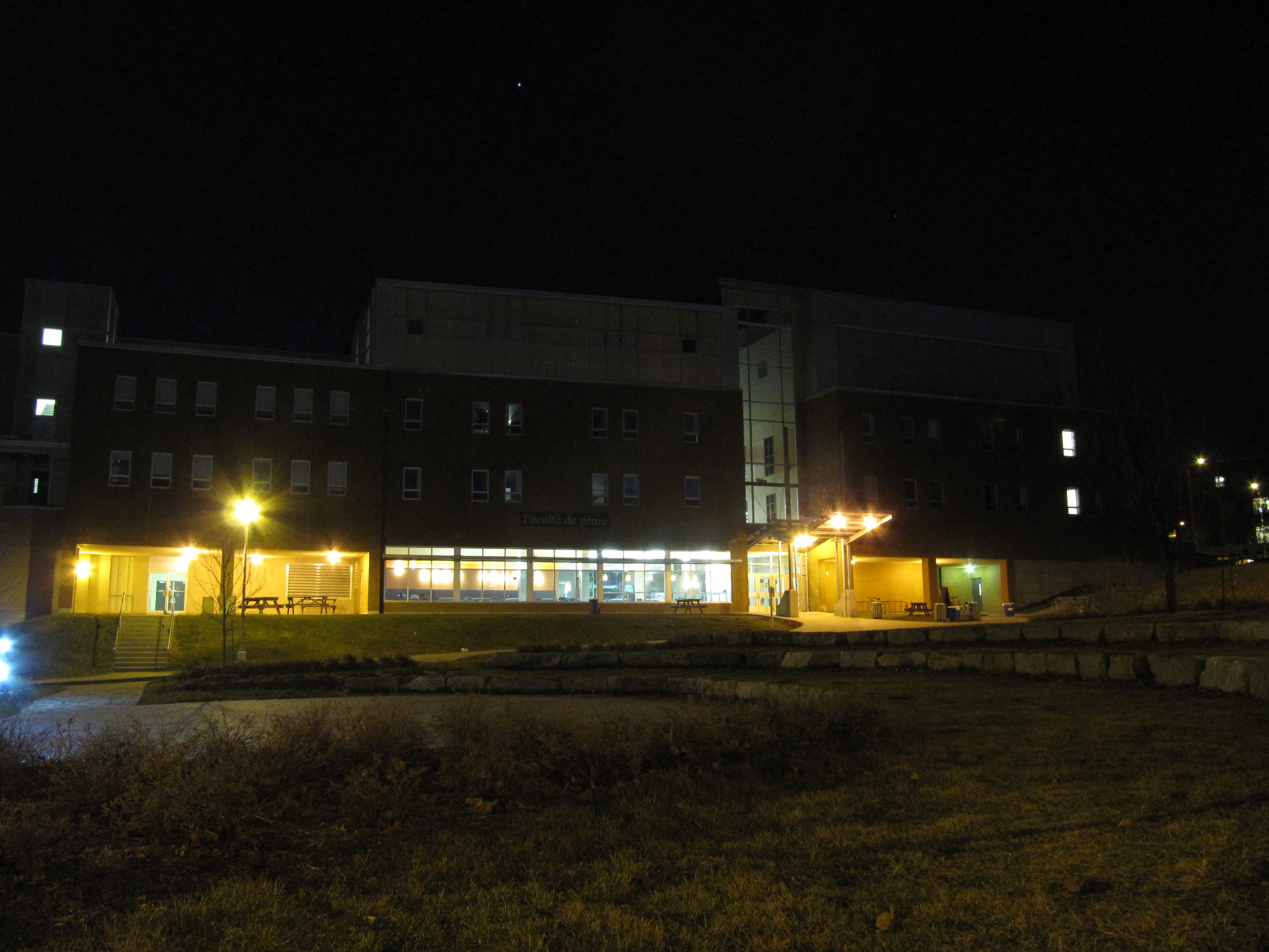 Faculté de Génie (pavillon J.-Armand-Bombardier) de l'Université de Sherbrooke.